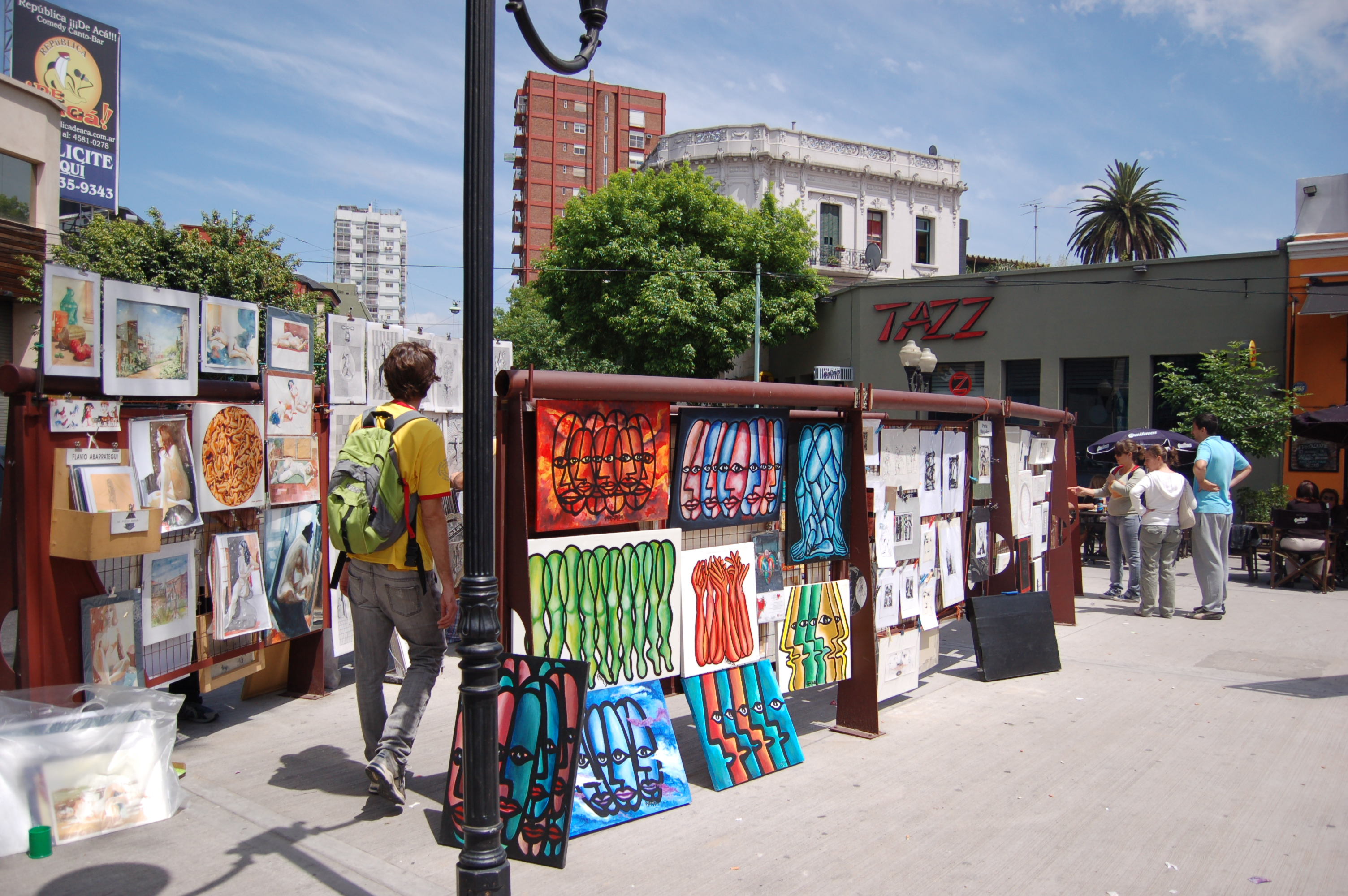 Cortazar Plaza, Palermo district, Buenos Aires.